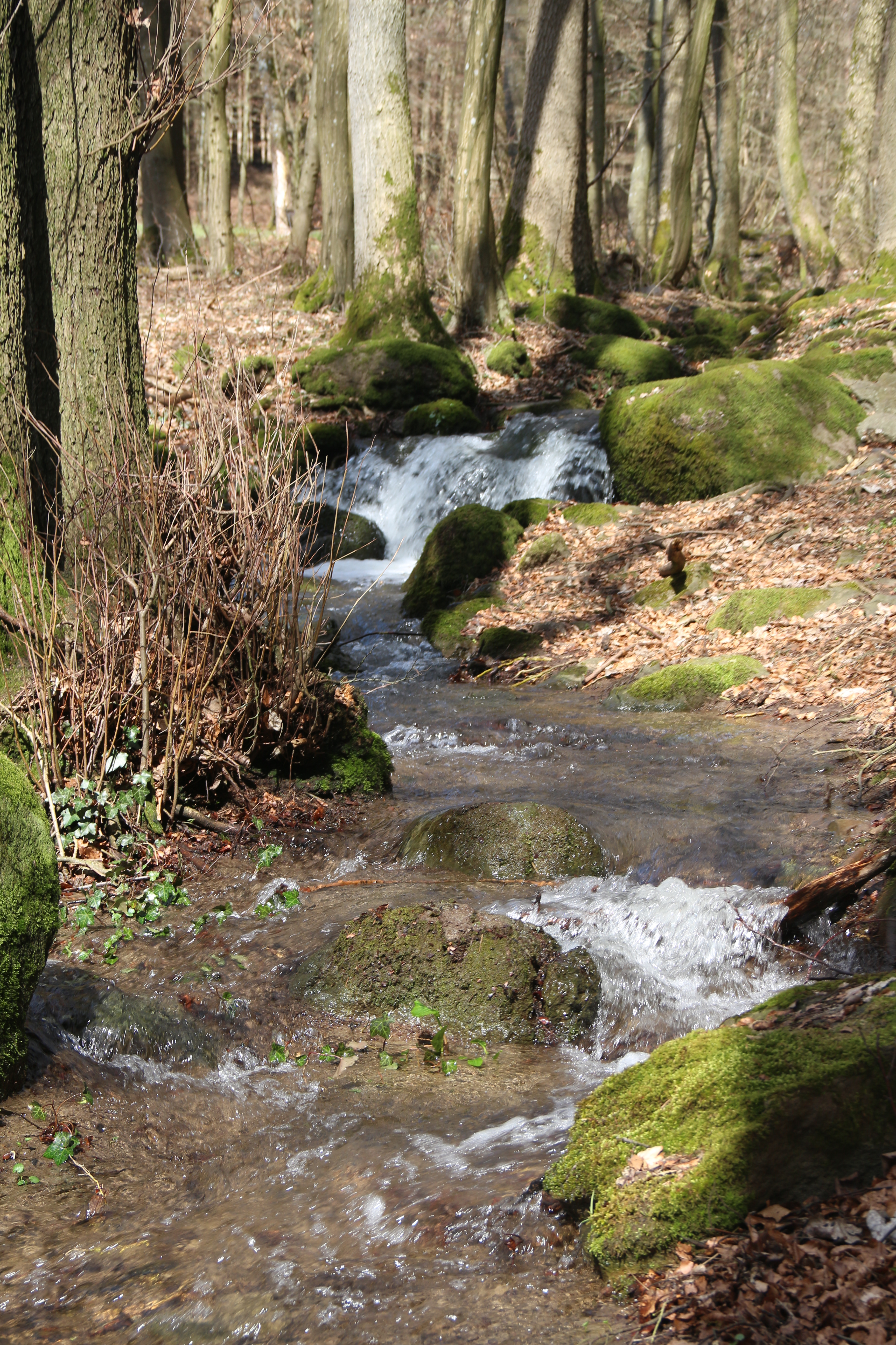 Hülsbach zw. Hülshof u. Hartenrod